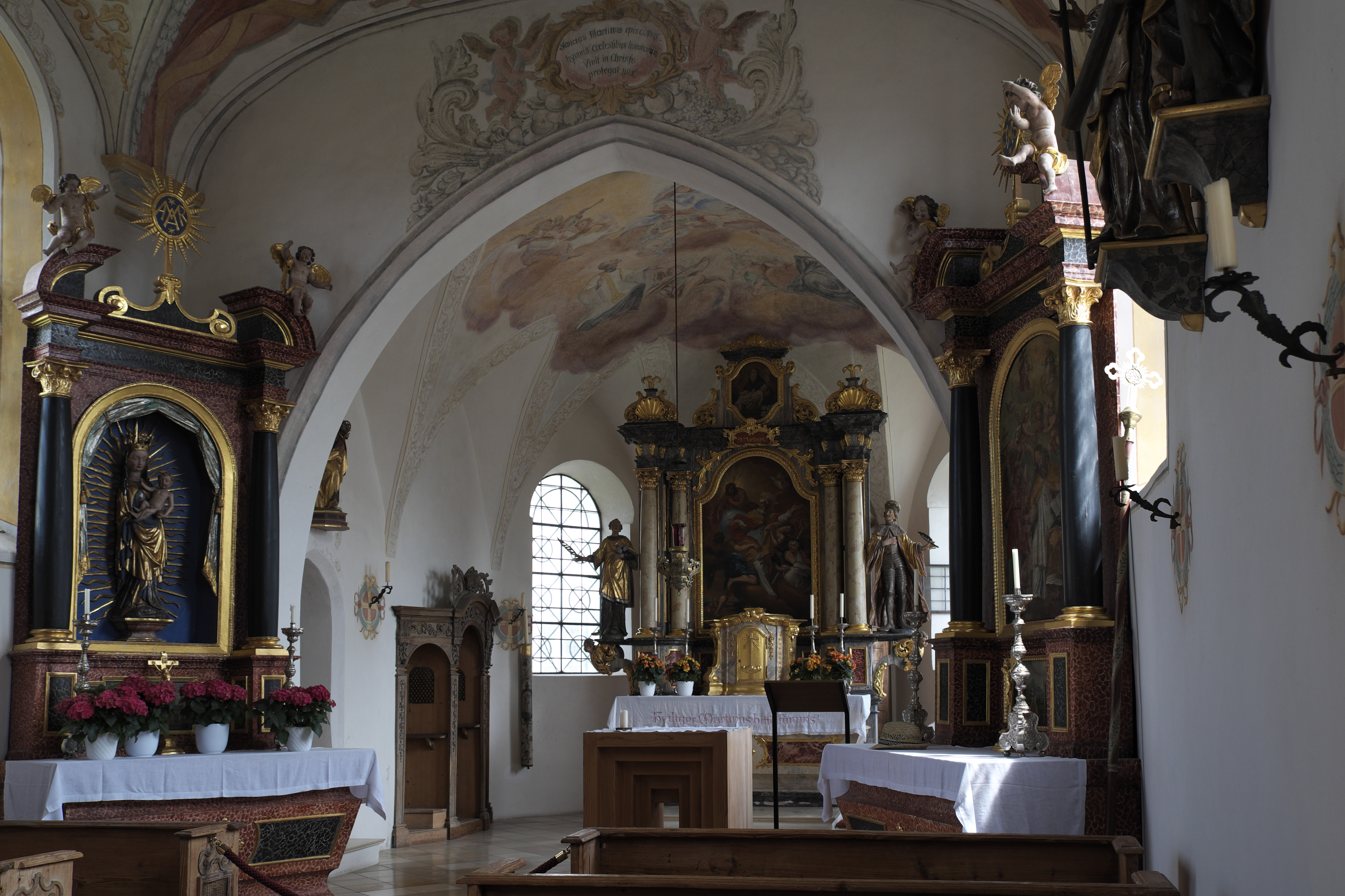 Katholische Filialkirche St. Martin in Steinebach am Wörthsee, einem Gemeindeteil von Wörthsee im Landkreis Starnberg (Bayern/Deutschland), Innenraum